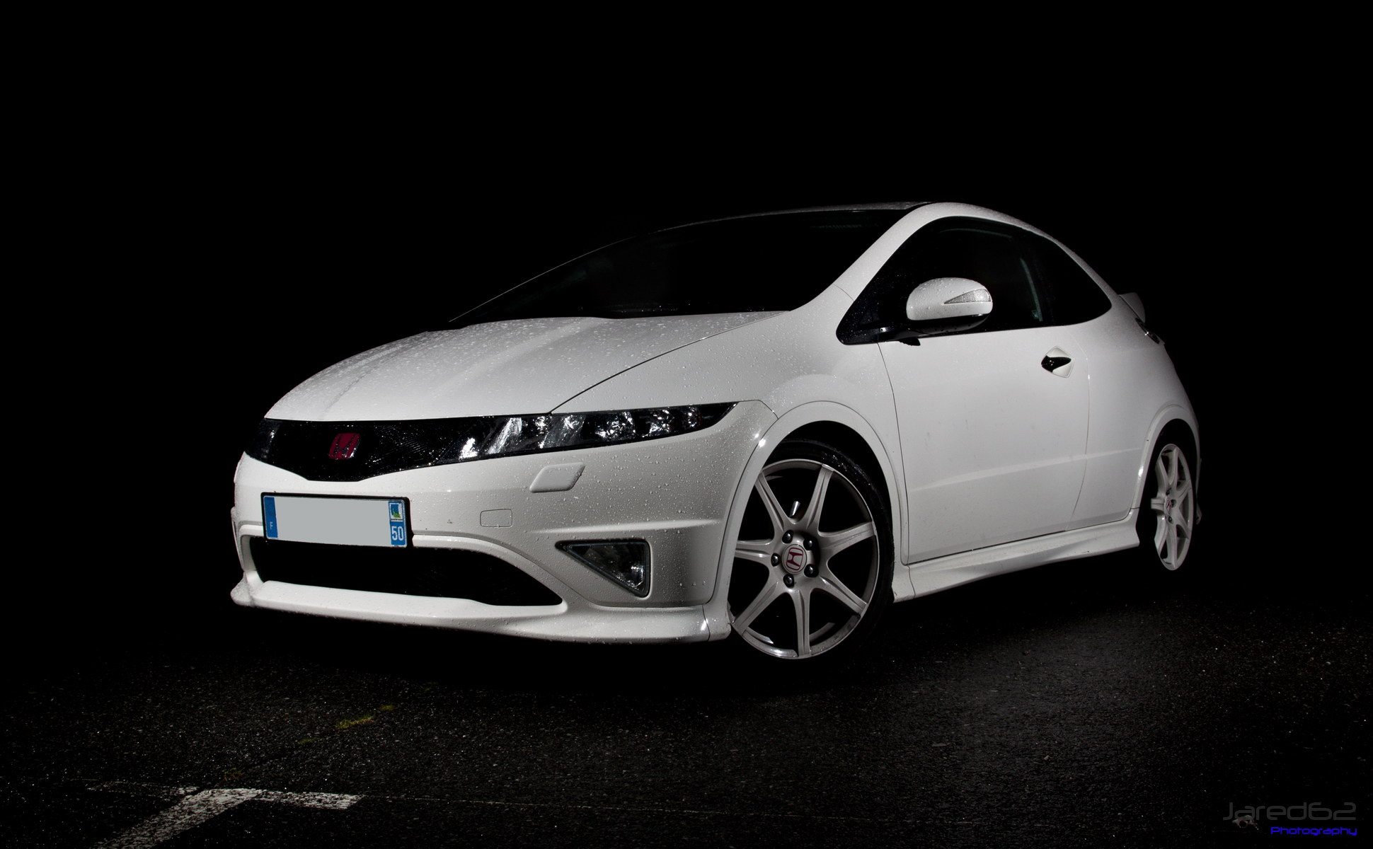 Honda Civic FN2 2.0 K20Z4 200cv